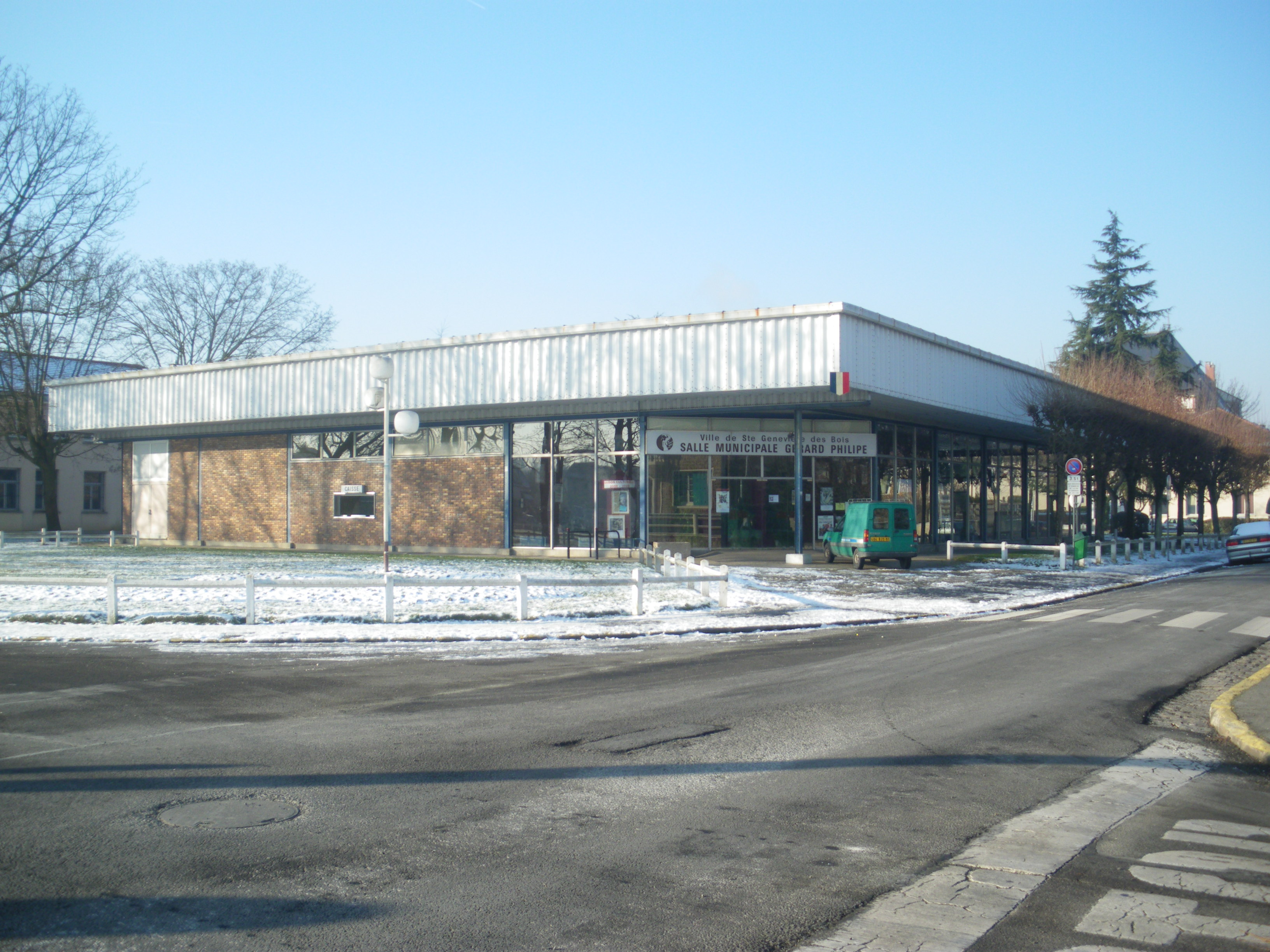 Salle municipale Gérard-Philipe de Sainte-Geneviève-des-Bois (Essonne).